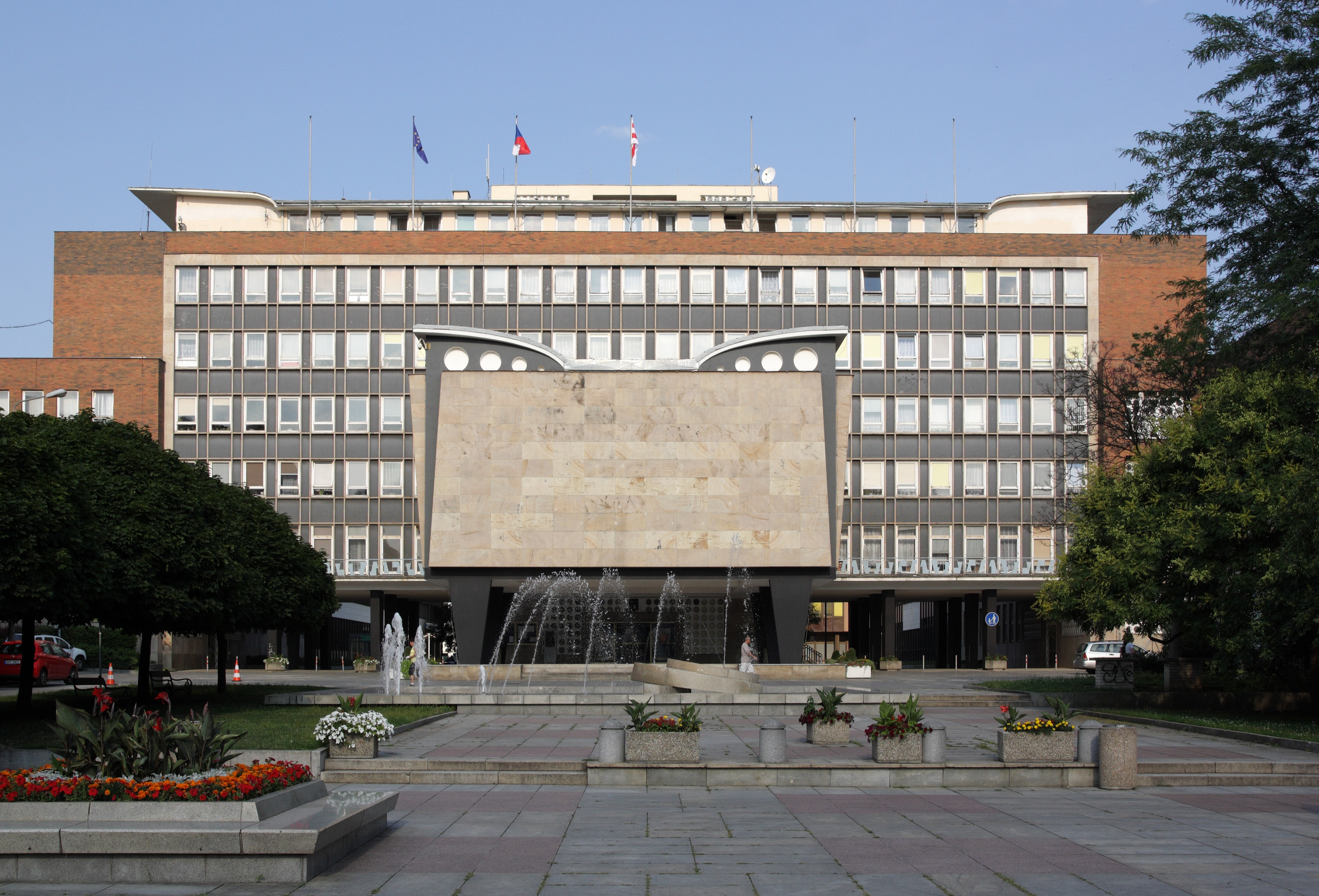 Ústí nad Labem - budova magistrátu, západní průčelí.